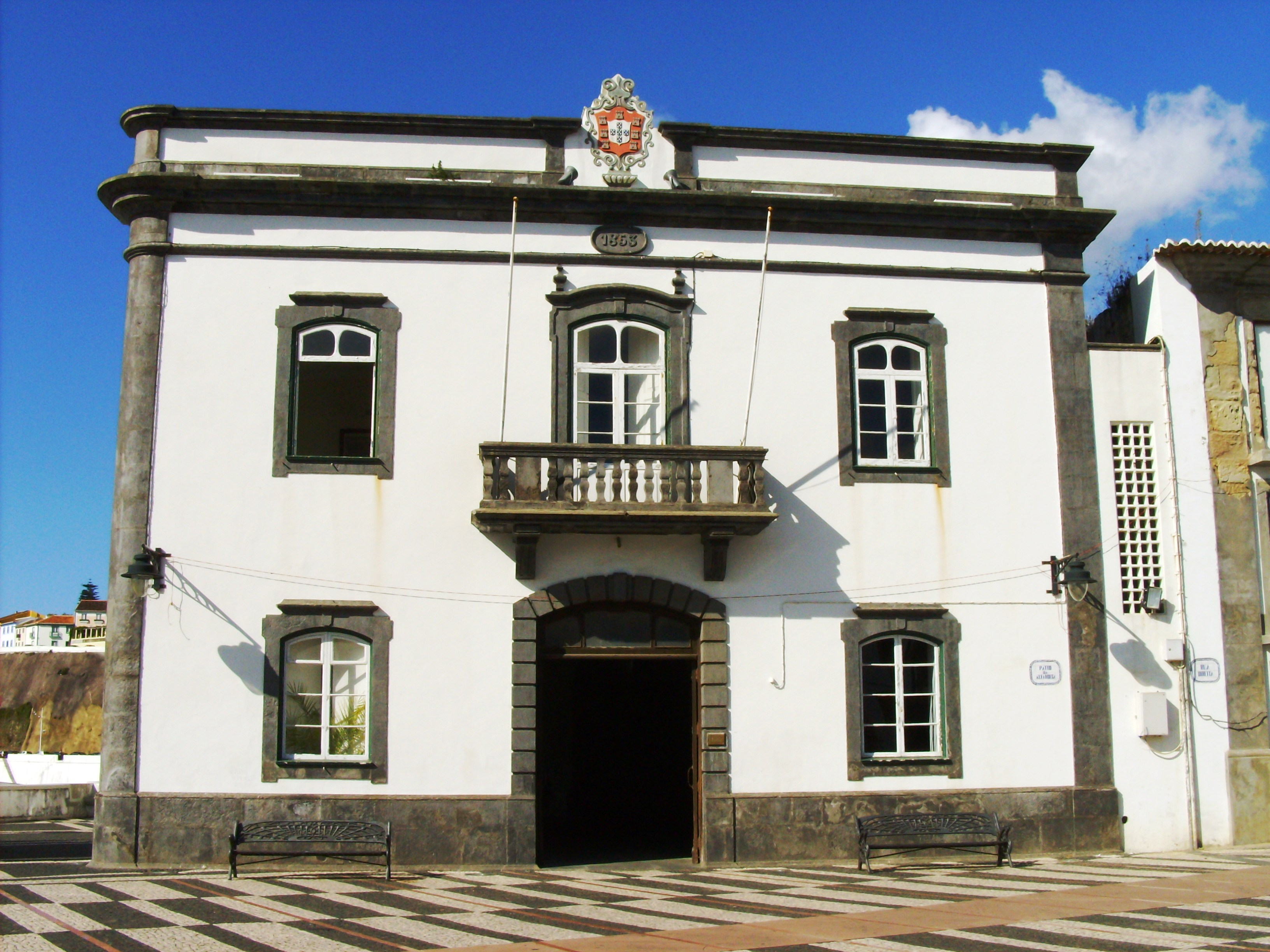 Antigo edifício da Alfândega, Angra do Heroísmo, Ilha Terceira, Açores.